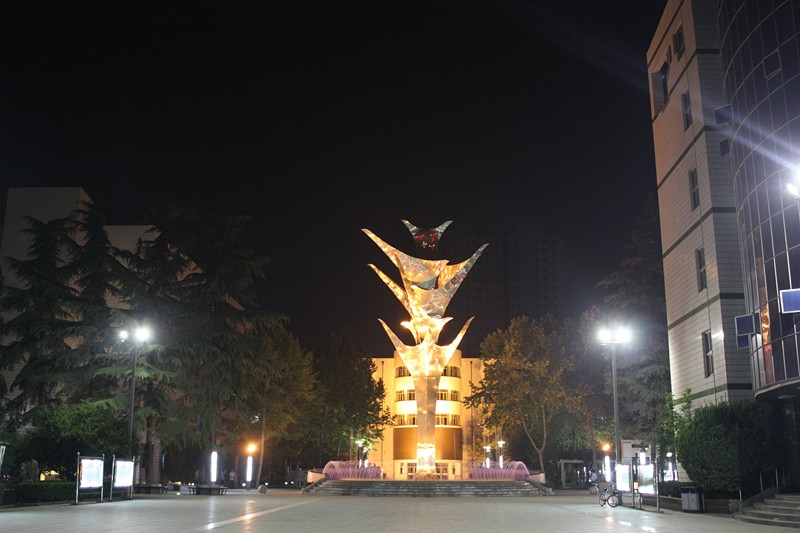 保定三中内的雕塑。